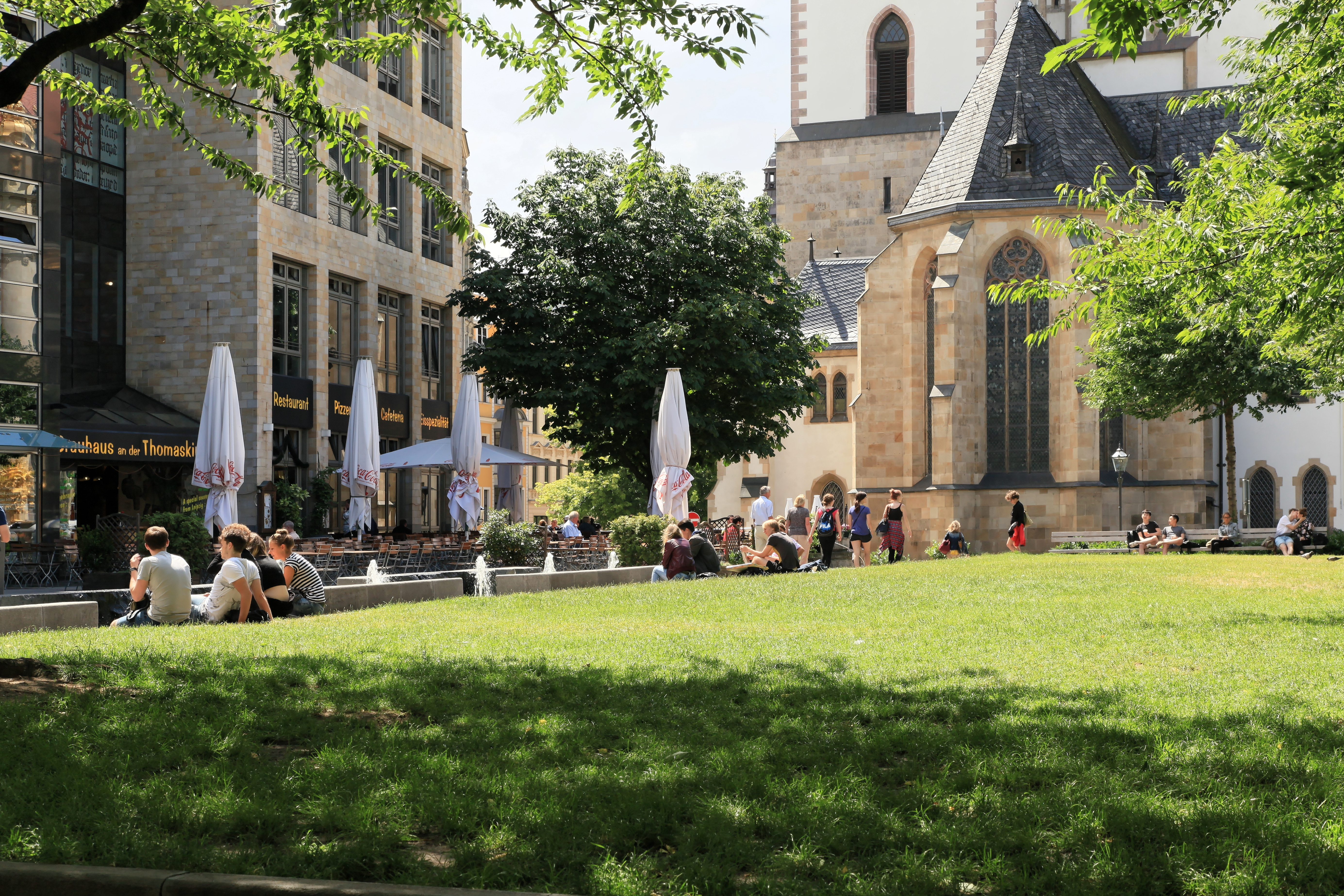 Thomaskirche hinter Thomasgasse und Thomaswiese in Leipzig